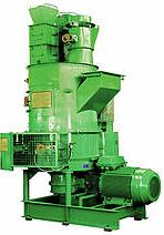 Mischer der Webac Gesellschaft für Maschinenbau